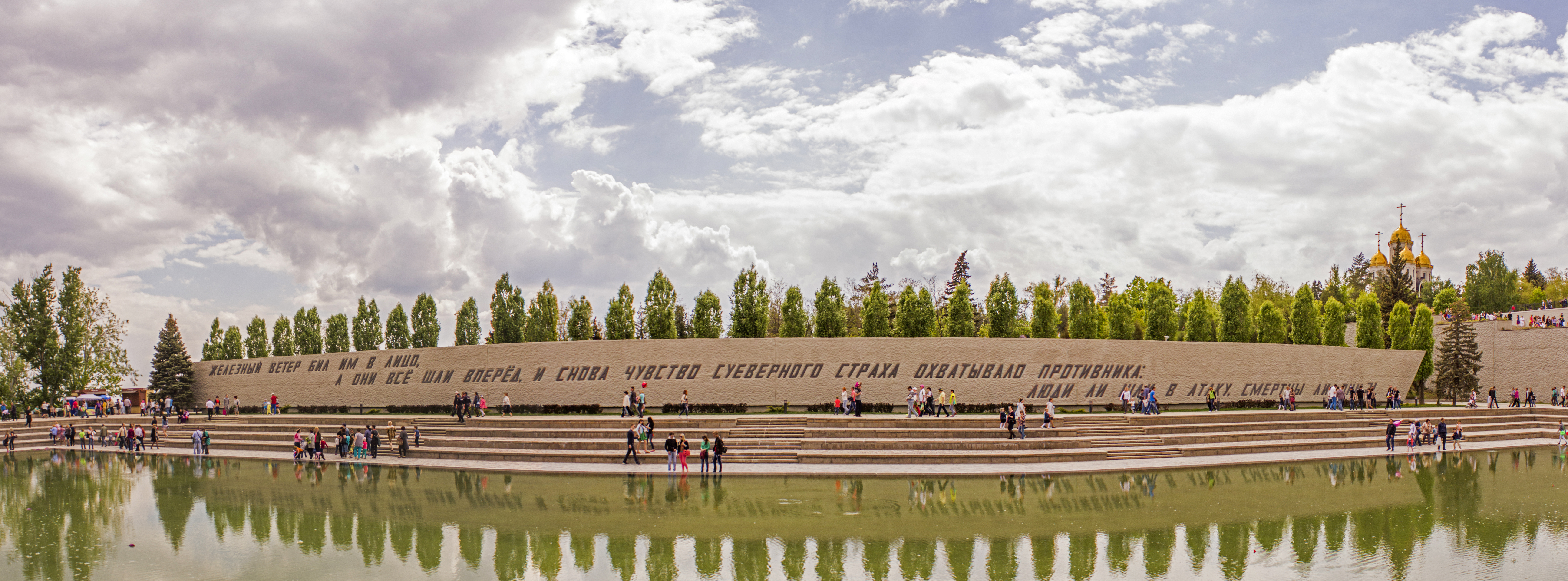 Город Волгоград: Волгоград, Волгоградская область